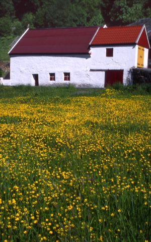 Gård like ved Nesttunvannet